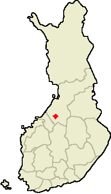 Own work